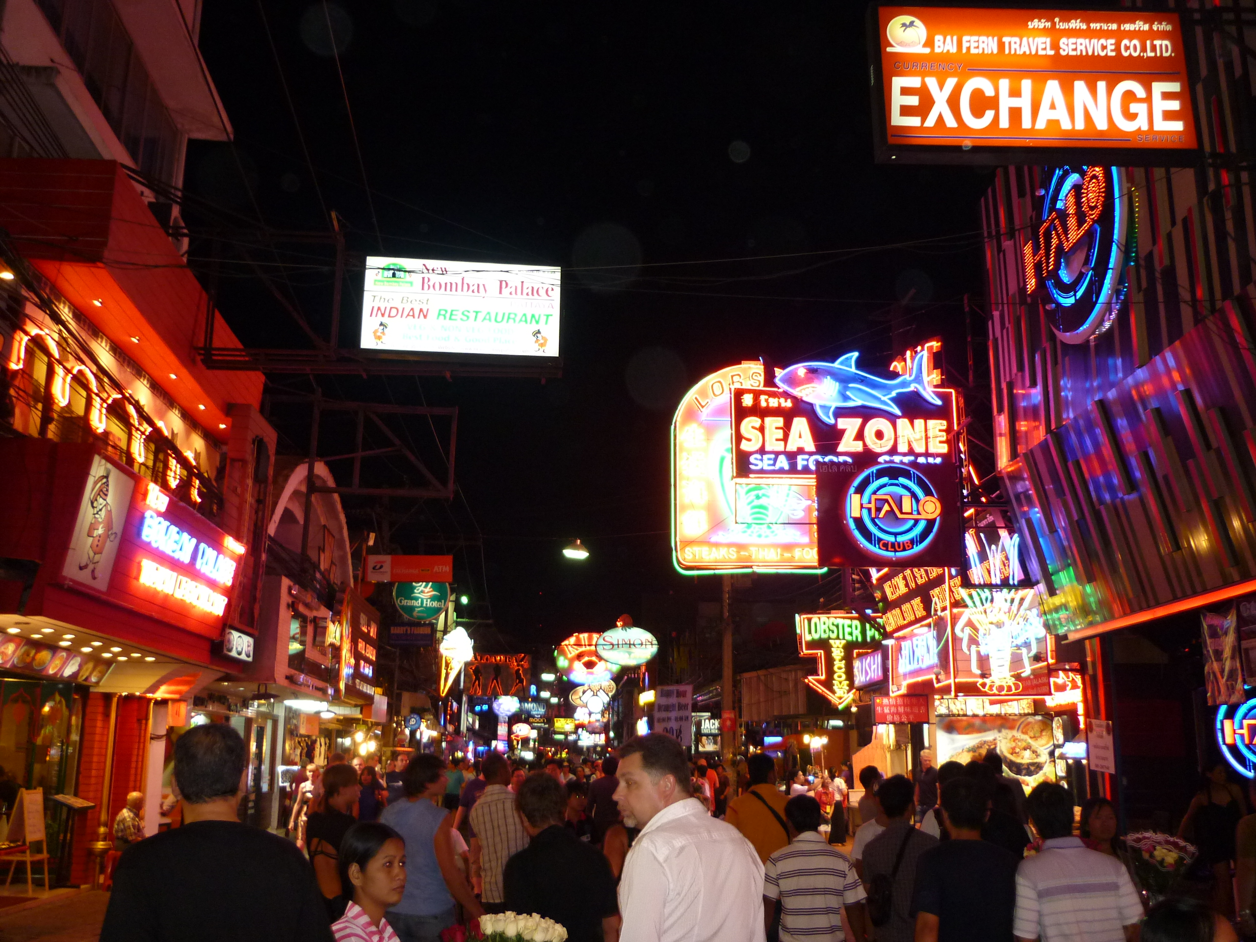 Част от Walking Street